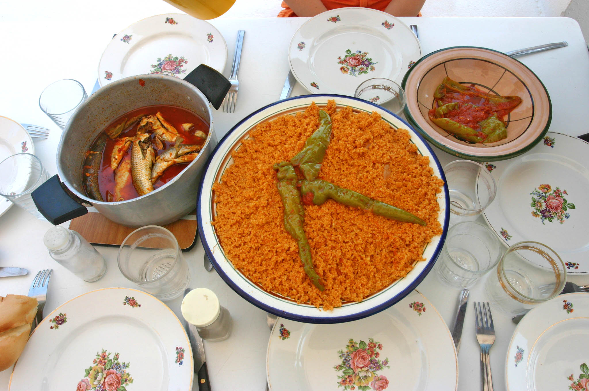 Photo personnelle d'un coucous typique des îles Kerkennah (Tunisie) août 2007.